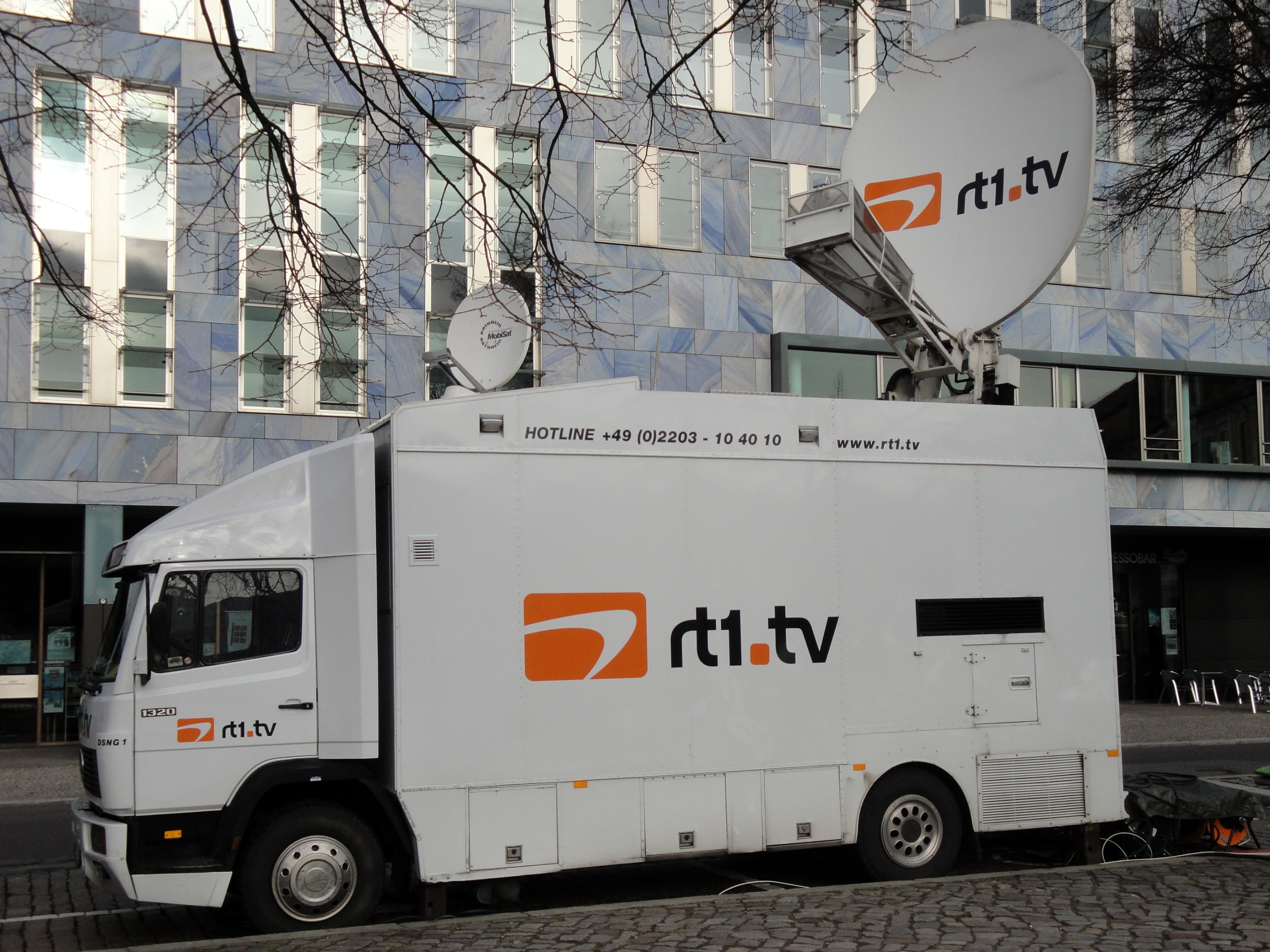 Mercedes-Benz 1320 Übertragungswagen rt1.tv production HD-DSNG 1